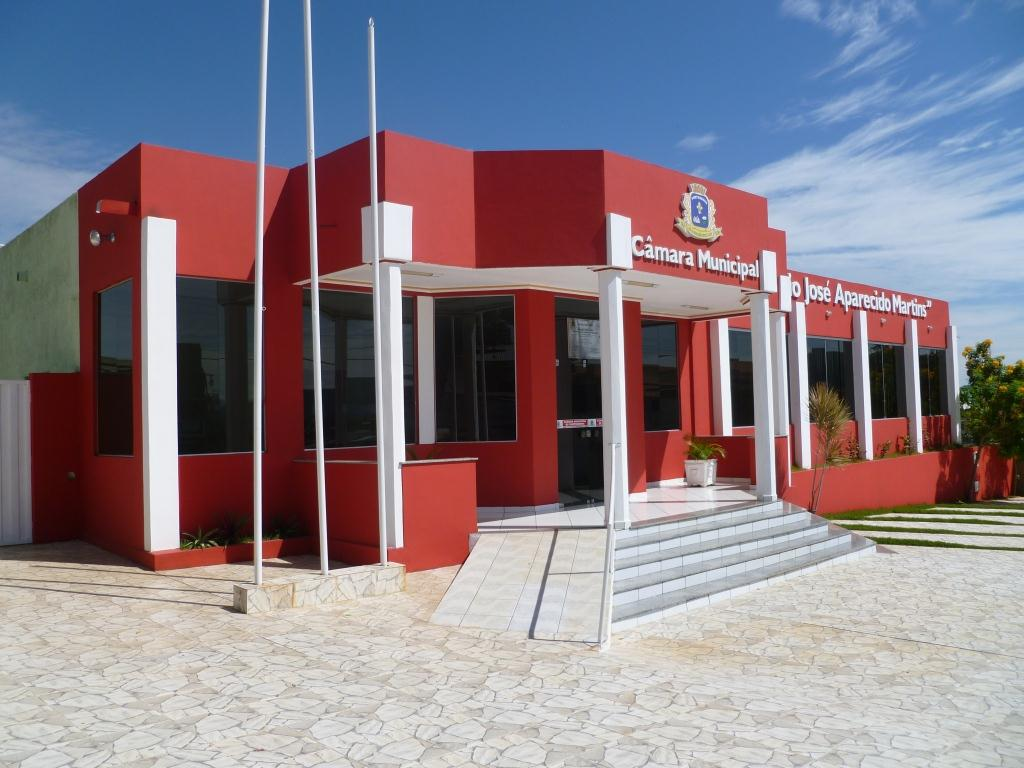 Câmara Municipal de Porteirinha, nomeada "Palácio José Aparecido Martins", Minas Gerais, Brasil.